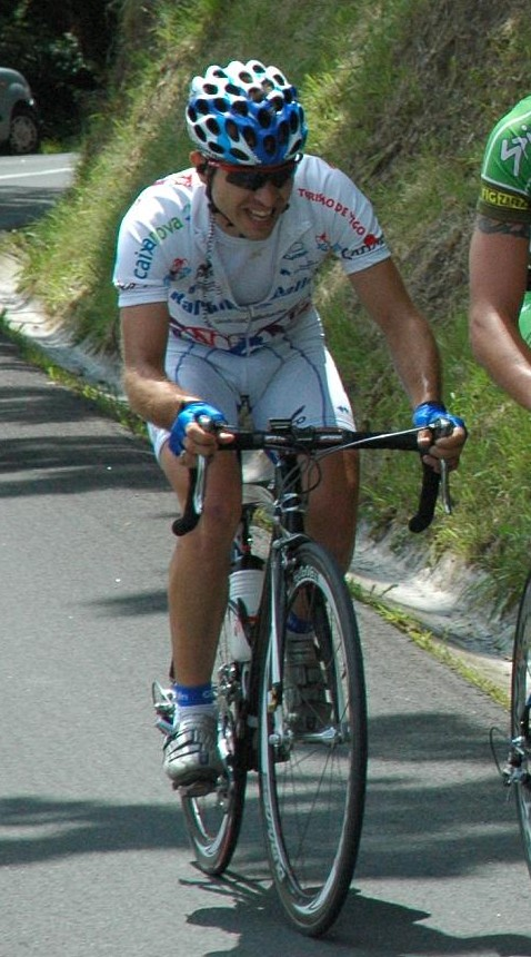 Iban Mayoz Euskal Bizikleta 2008, 3rd stage.